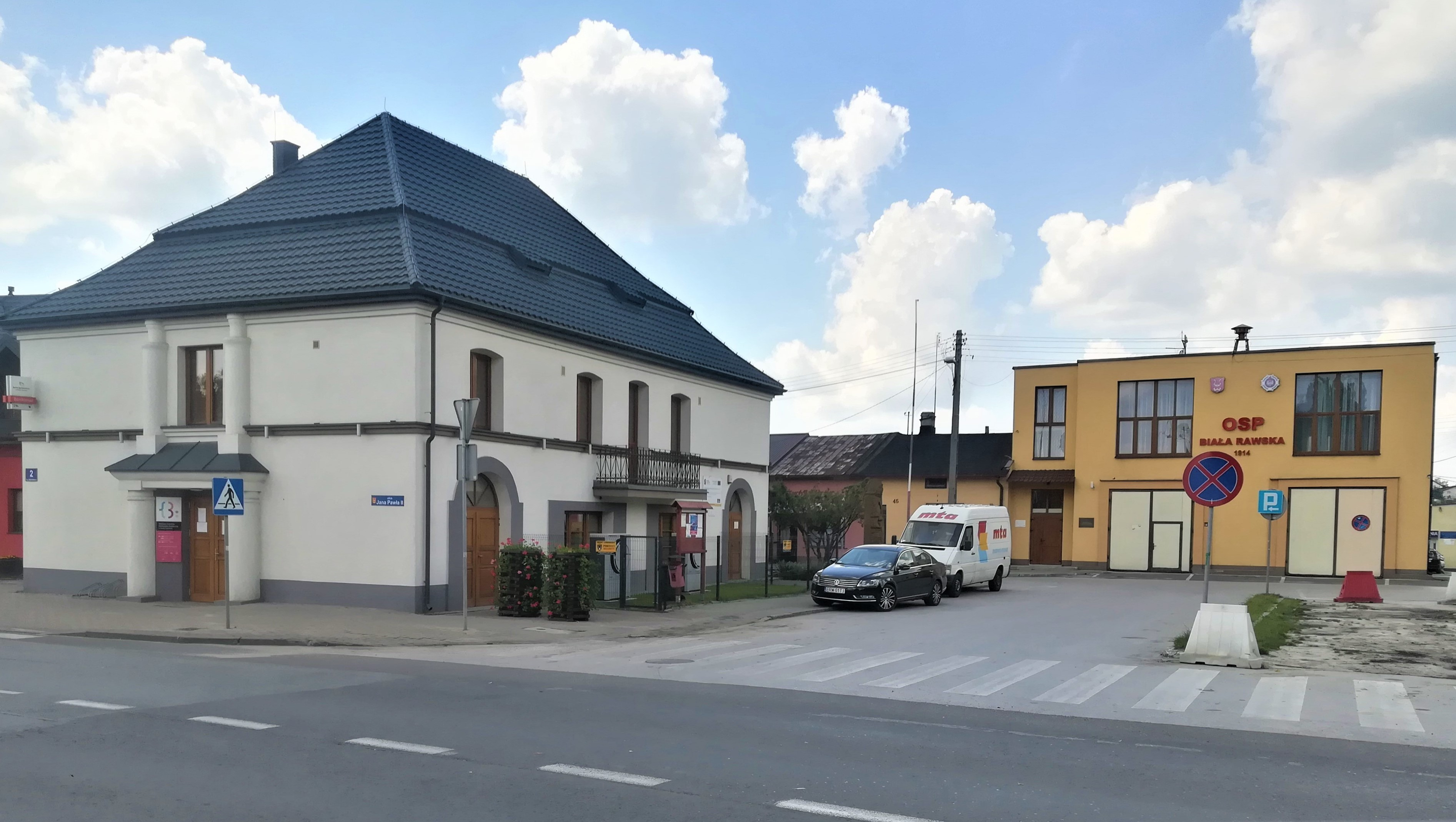 Widok miejski z Białej Rawskiej.